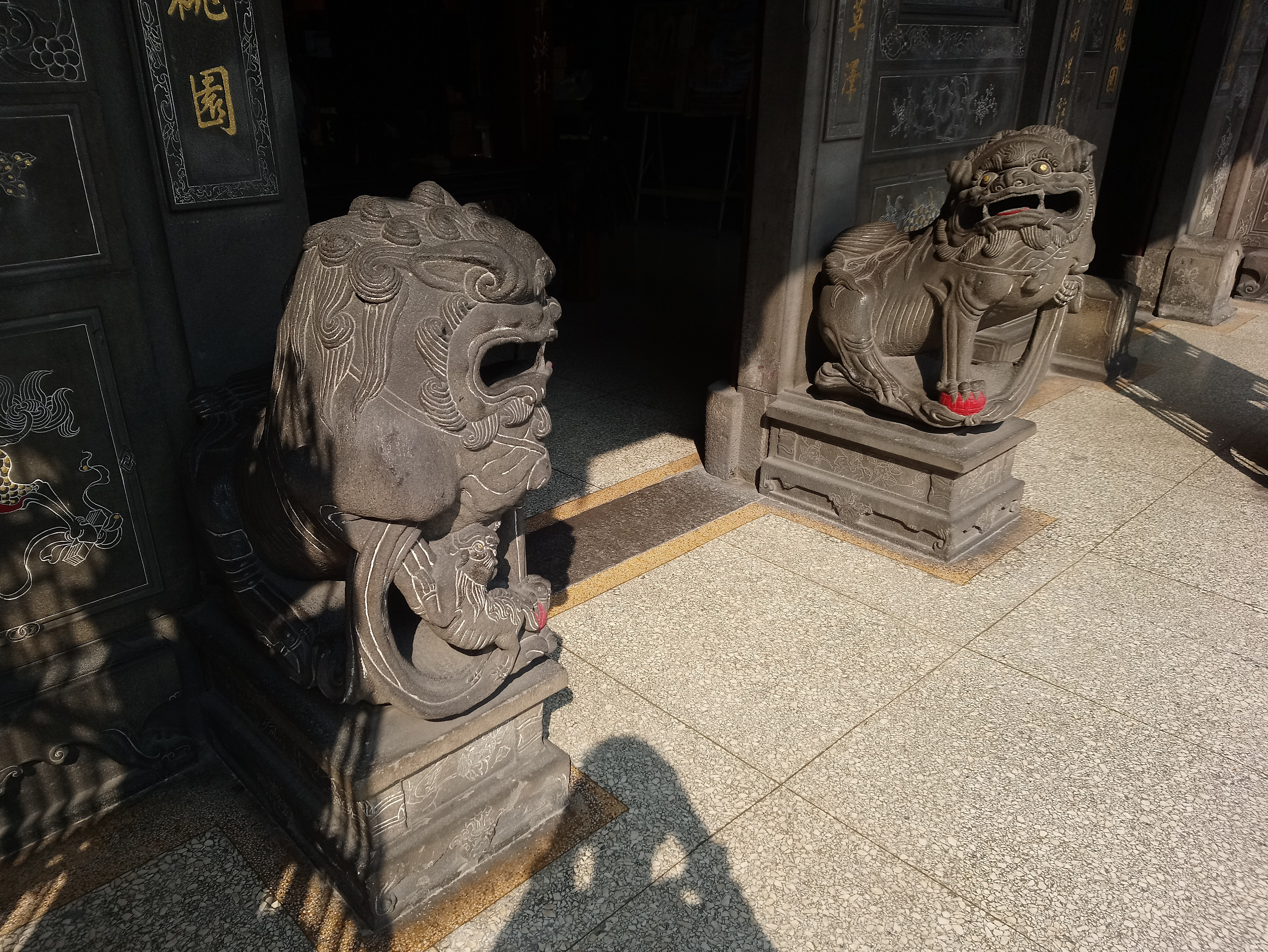 桃園景福宮石獅,桃園市桃園區市中次分區中和里